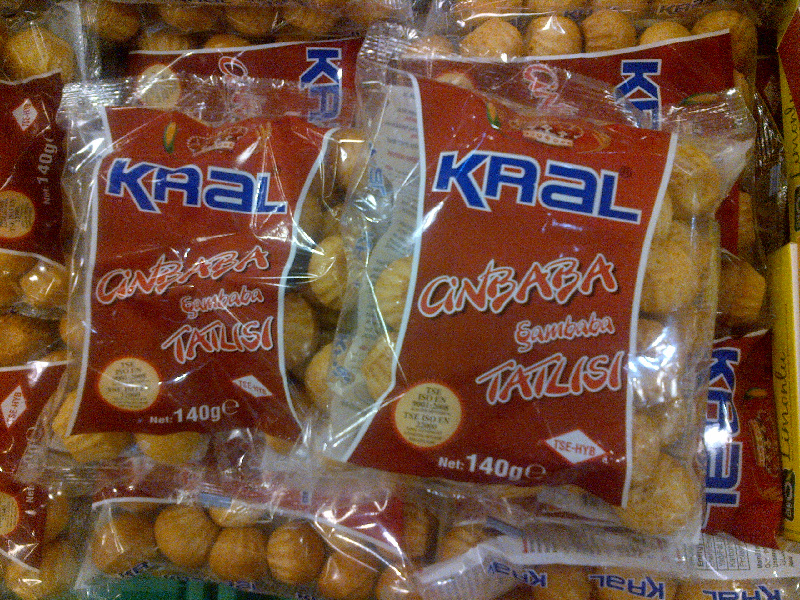 Şambaba tatlısı también se vende pre-elaborado para terminar de cocinar en casa.